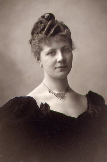 Portrait (Photographie P. Bellingard à Lyon ~1900)